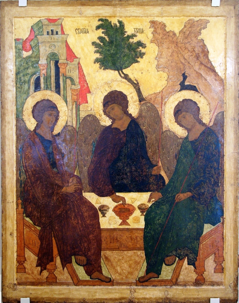 Icon of Holy Trinity, museum of A.Rublev. Троица Живоначальная. 1484-1485. Музей им. Андрея Рублева, ВП 21. Икона поступила в Музей им. Андрея Рублева в 1954 г. из Успенского собора Иосифо-Волоколамского монастыря. Реставрирована К.Г. Тихомировой и И.В. Ватагиной в 1955 и 1975 гг. Сохранность: значительно утрачены одежда правого (особенно хитон) и среднего Ангелов, нимб правого Ангела. На одежде левого и на рукаве среднего Ангелов авторская живопись утрачена.